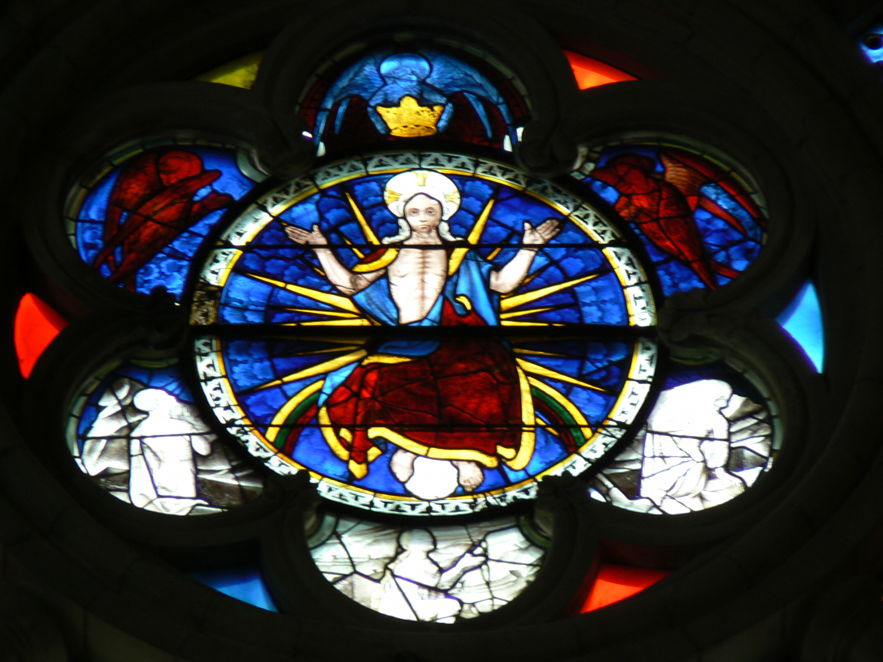 Partie centrale de la rosace nord de la cathédrale d'Angers